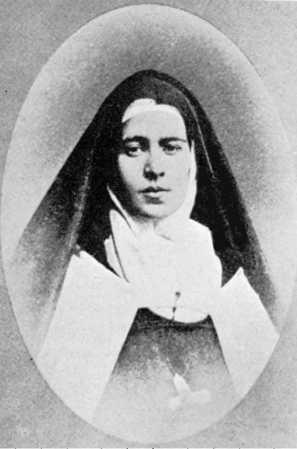 Une jeune québécoise, Hermine Frémont (1851-1873)-première Carmélite canadienne-est à l'origine de la décision du Carmel de Reims de s'établir à Montréal. Les quelques mois qu'elle passe au Carmel de Reims, avant sa mort prématurée, inspirent un effort héroïque. Moins de dix-huit mois après, le 6 mai 1875, six Carmélites françaises débarquent à Québec, en route pour Montréal.